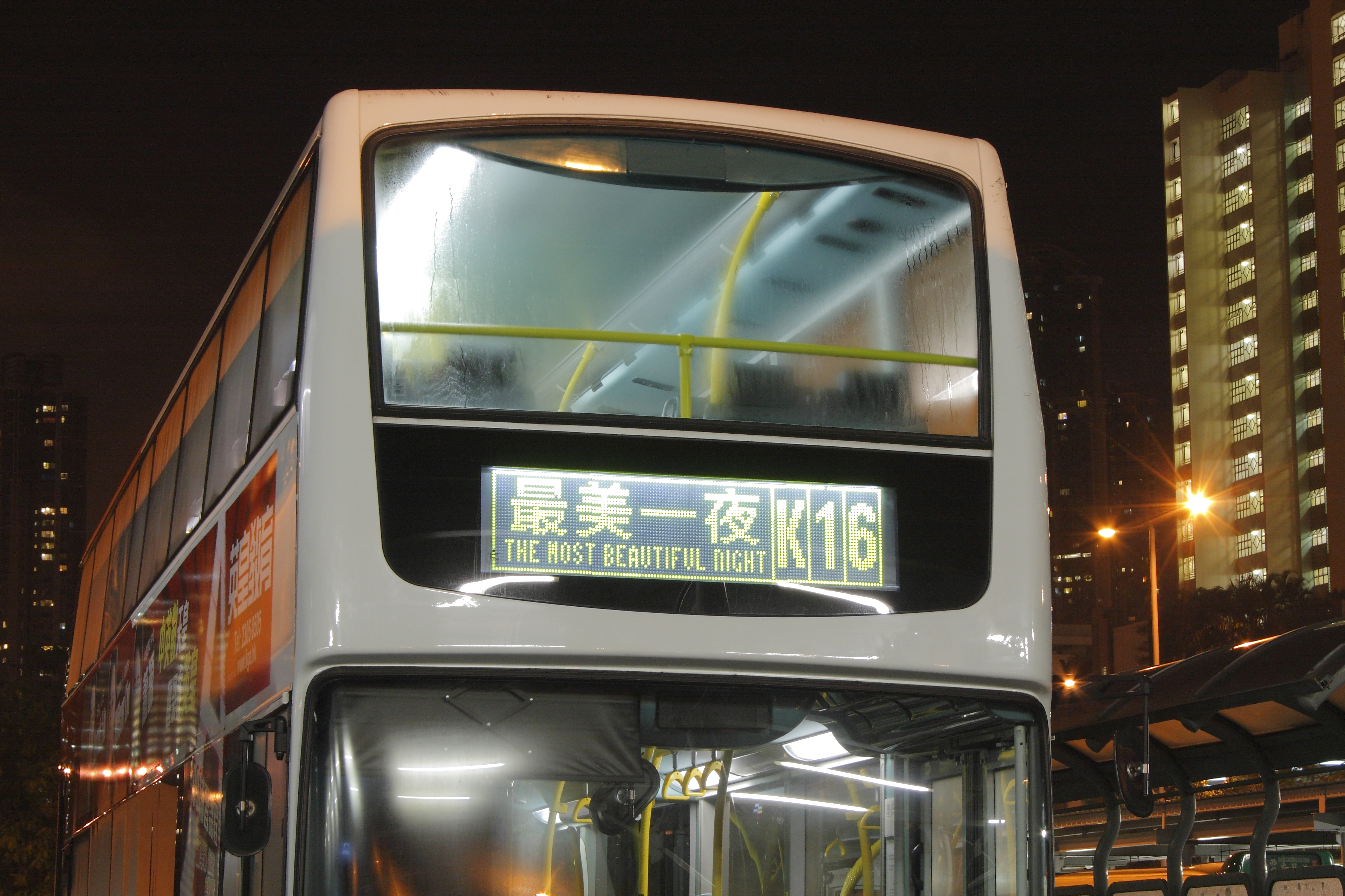 中文（香港）: 港鐵接駁巴士K16最後營運日的尾班車到達南昌巴士總站之後，其電牌顯示出一段告別字句